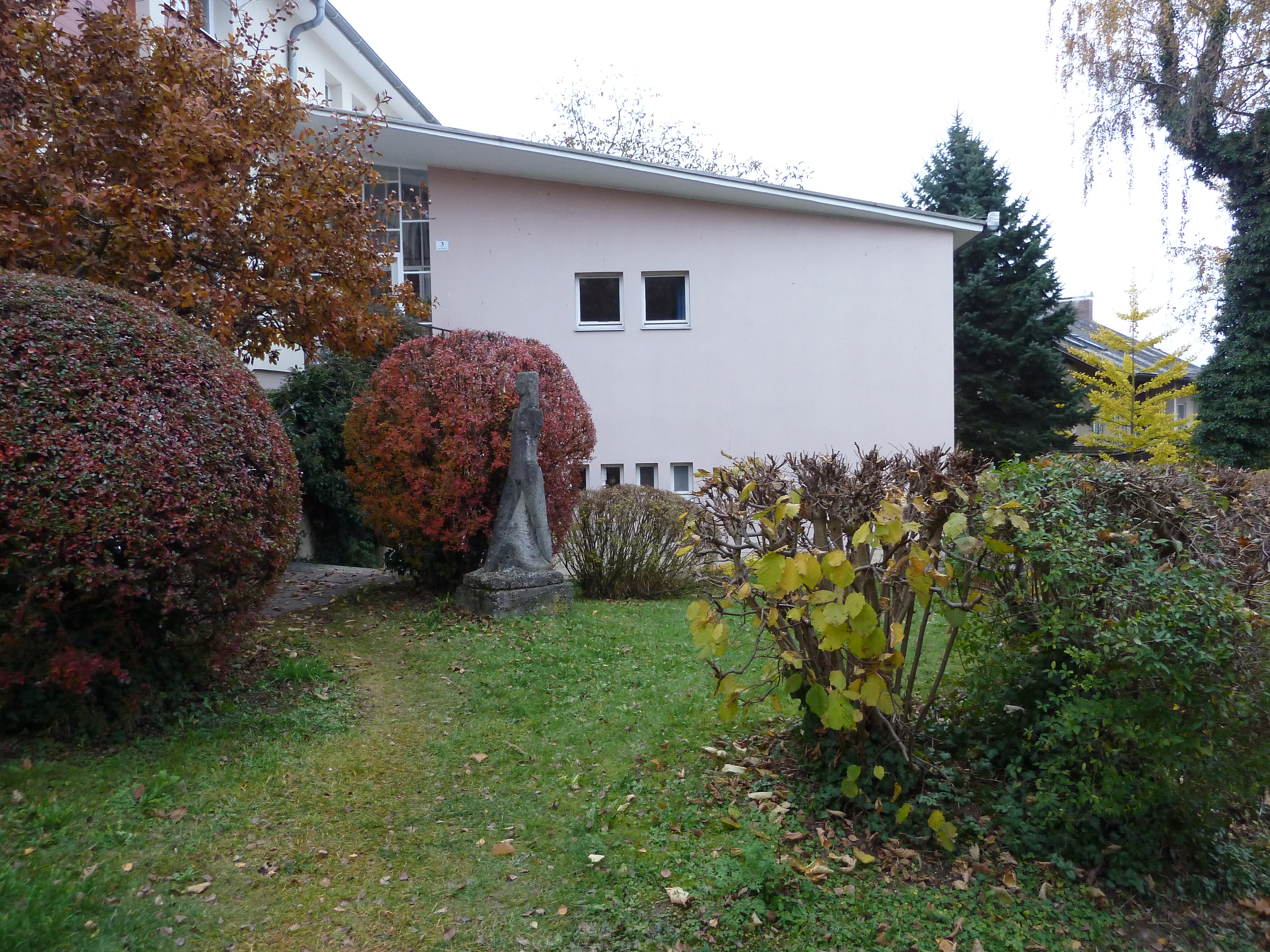 Wohnhaus, Atelier mit Skulptur